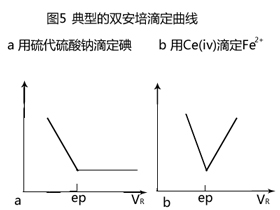 中文（中国大陆）: 安培滴定法图